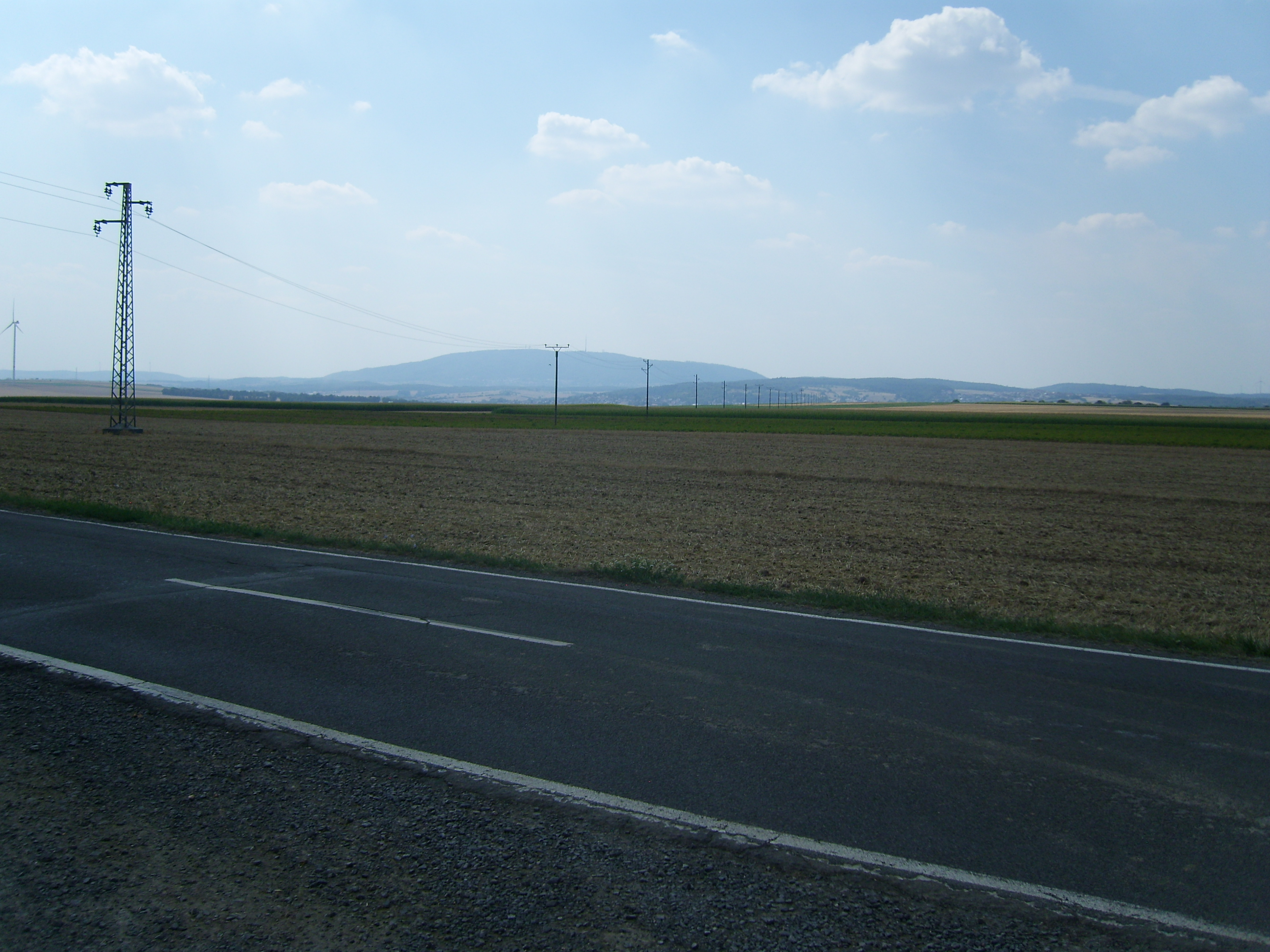 Donnersberg (687 m), Kuhkopf (430 m; halbrechts) und Großer Krehberg (481 m; rechts) vom Ilbesheimer Plateau (bis 317,2 m; Alzeyer Hügelland) bei Ilbesheim (rechts, etwa 500 m entfernt)